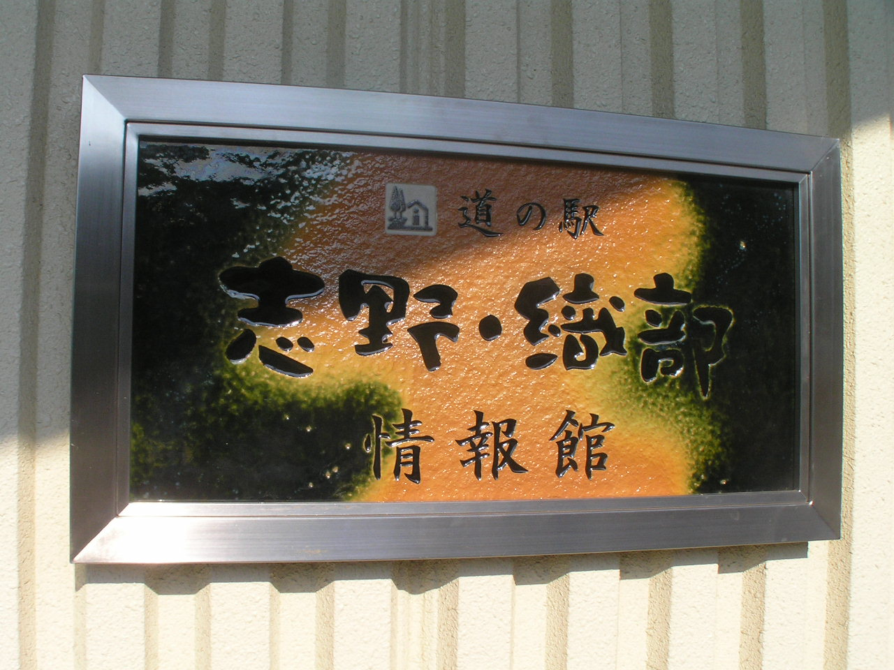 道の駅志野・織部銘板